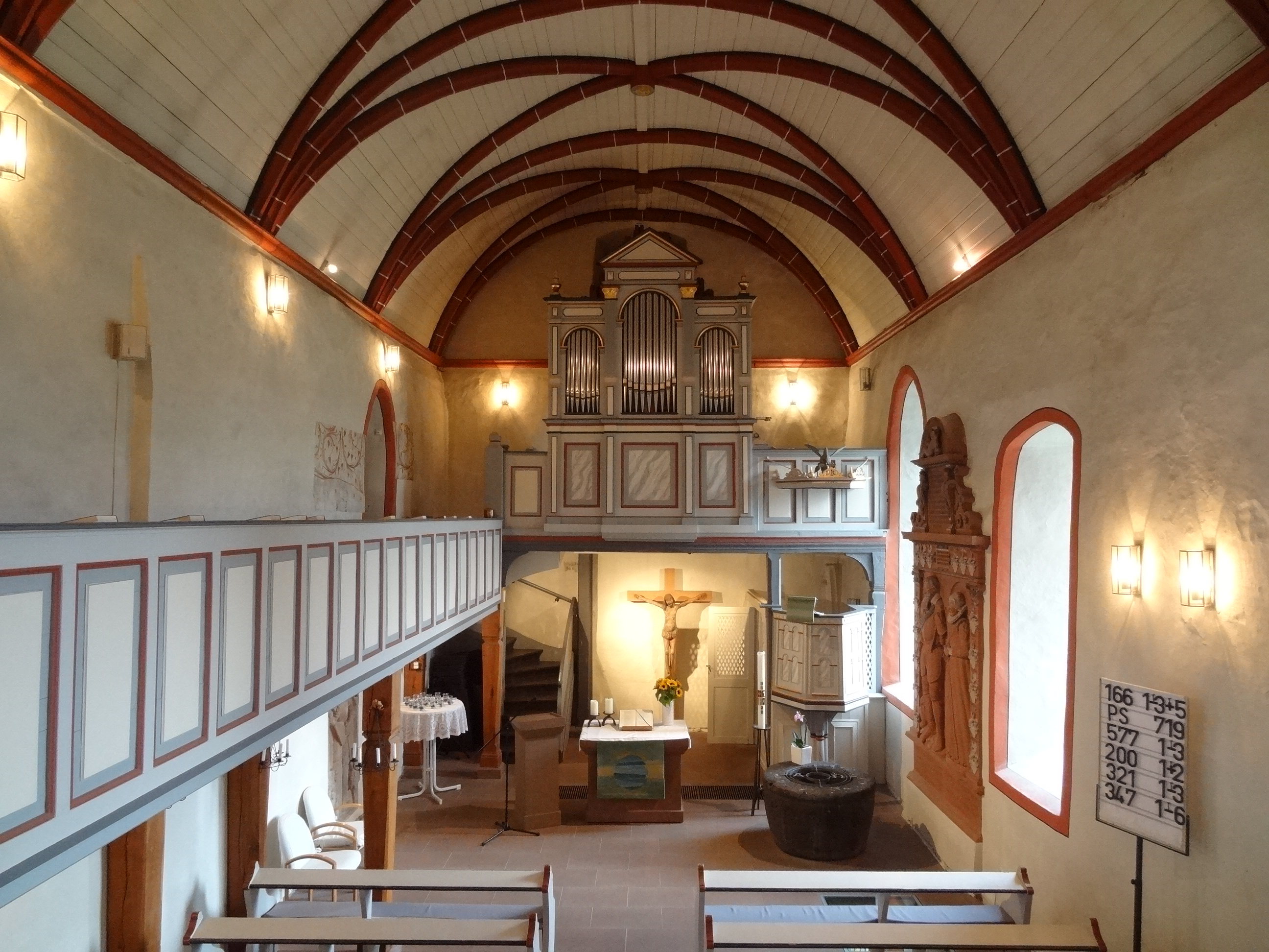 Evangelische Kirche Alten-Buseck